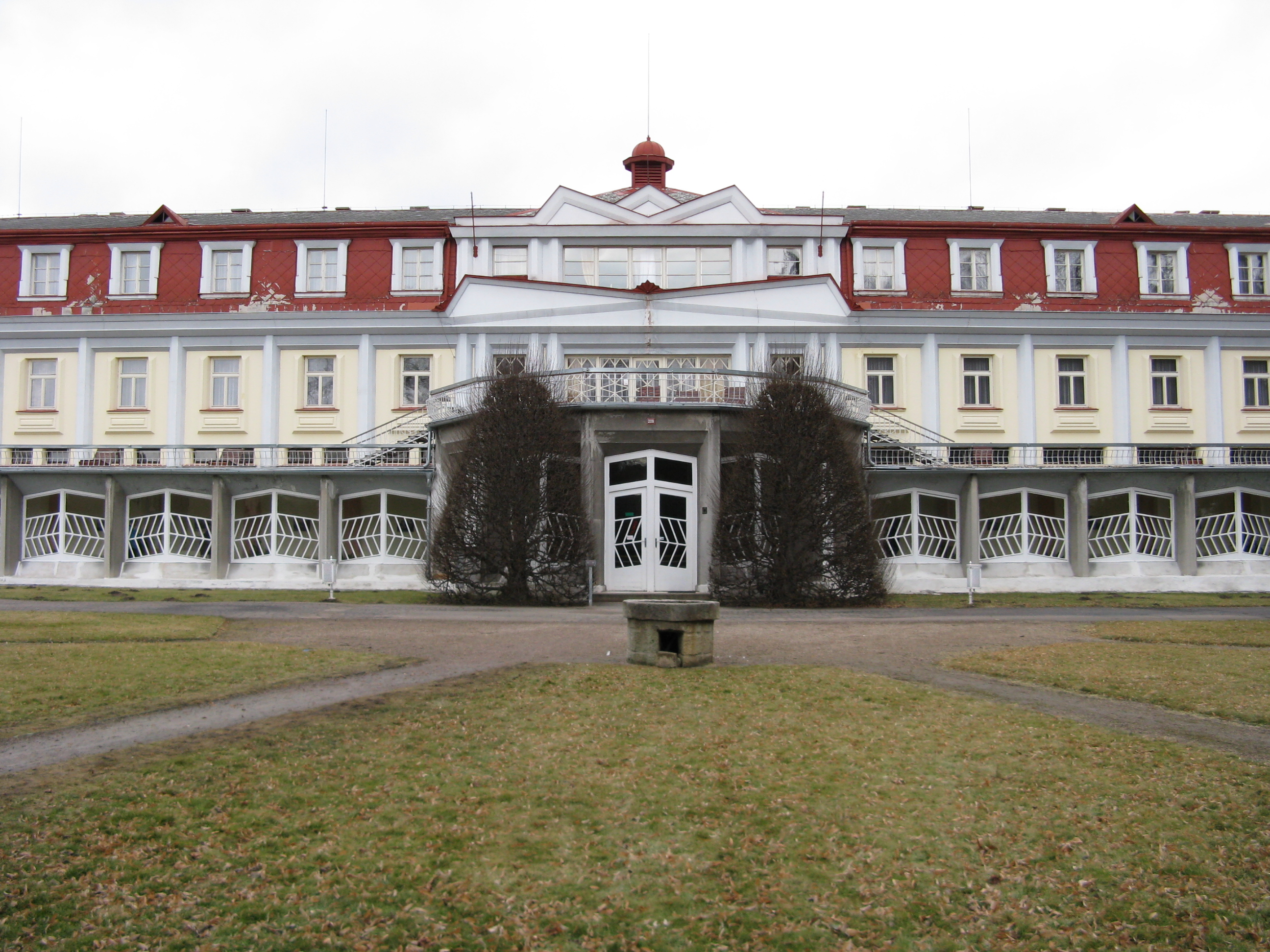 Lázeňský pavilón Gočárův s parkem (Lázně Bohdaneč), Lázně Bohdaneč 209, Lázně Bohdaneč.